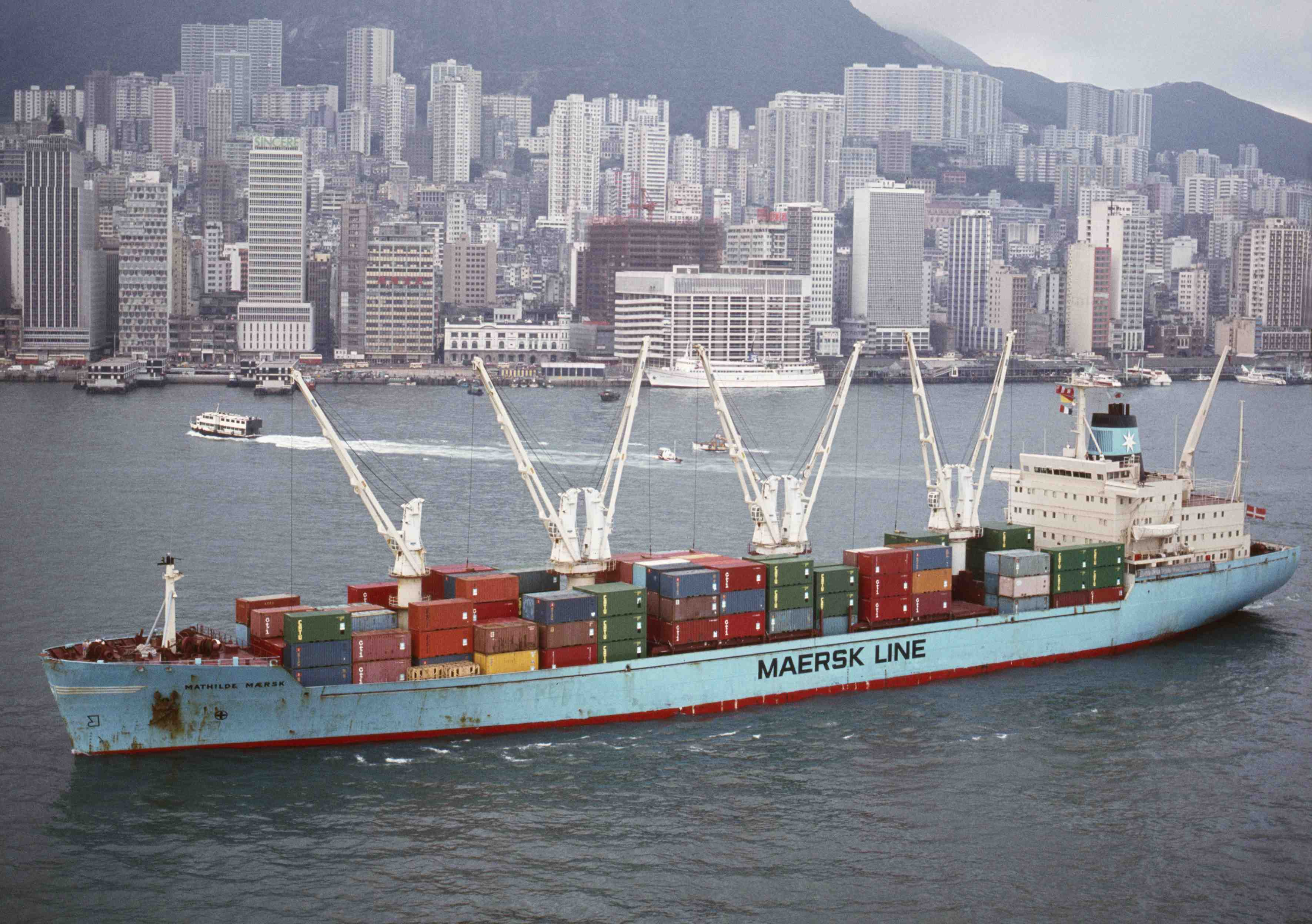 Mathilde Mærsk (1975)